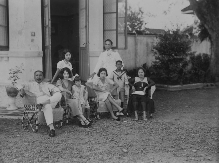 foto. Groepsportret van een Indische familie voor hun huis